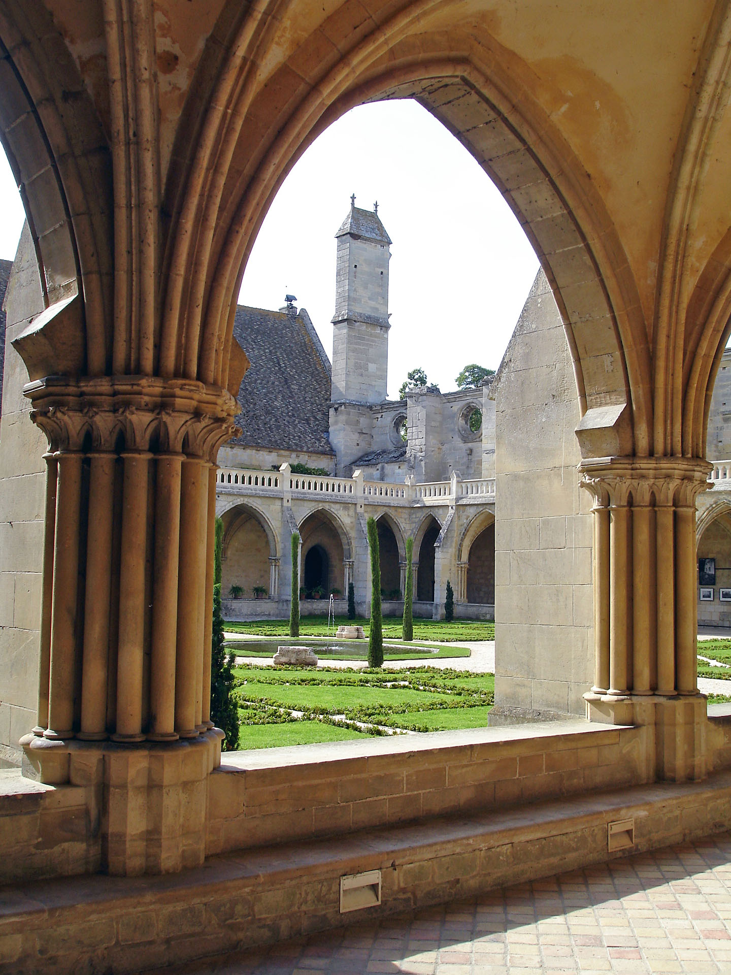 Vue d'une baie du cloître de l'abbaye de Royaumont, Val-d'Oise, France.